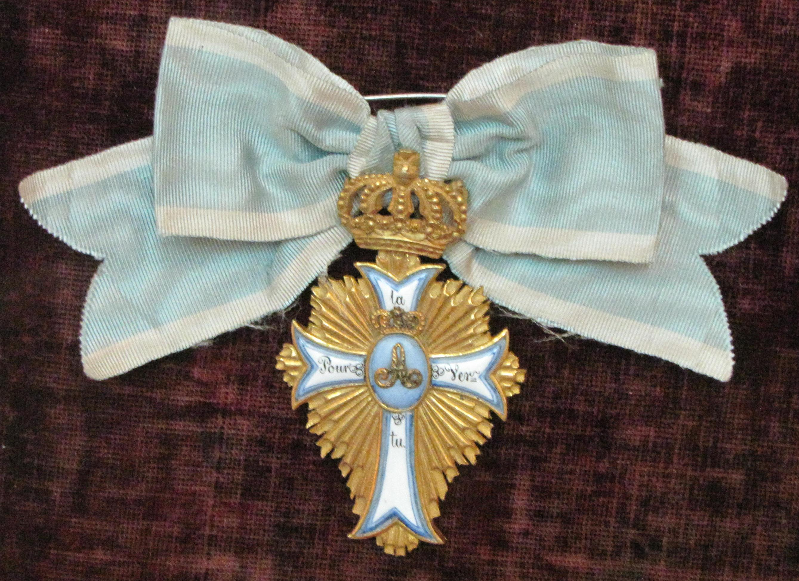 Ribnitz, Klosterkirche, Nonnenchor: Klosterorden Pour la vertu, Fassung für Dobbertin